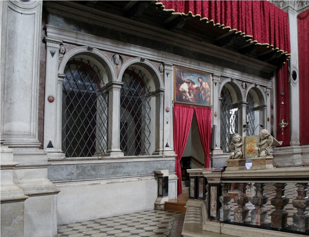 Accesso alla cappella di San Paolino - Chiesa di S. Pietro in Oliveto - Brescia